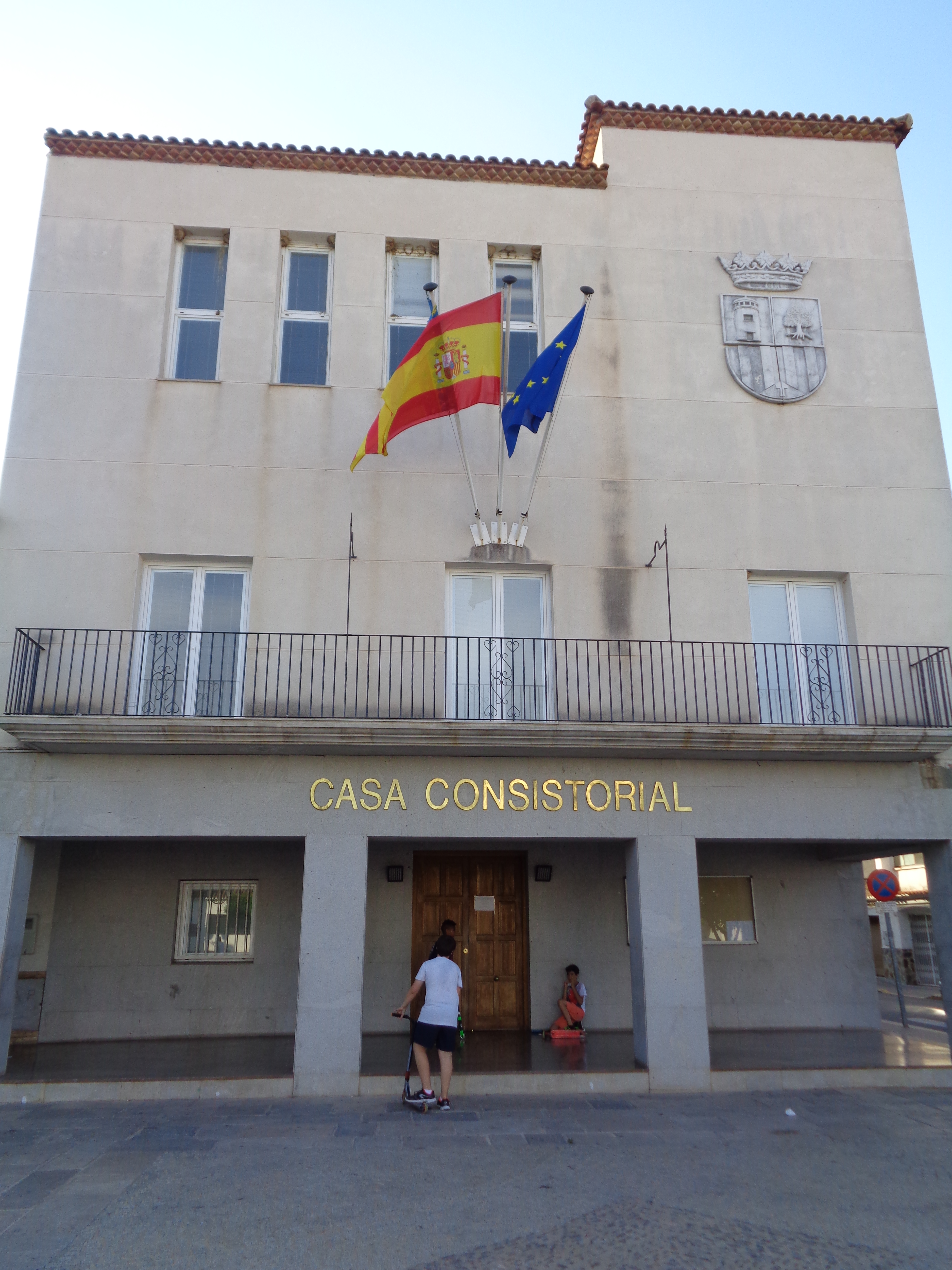 Sant Antoni de Benaixeve.